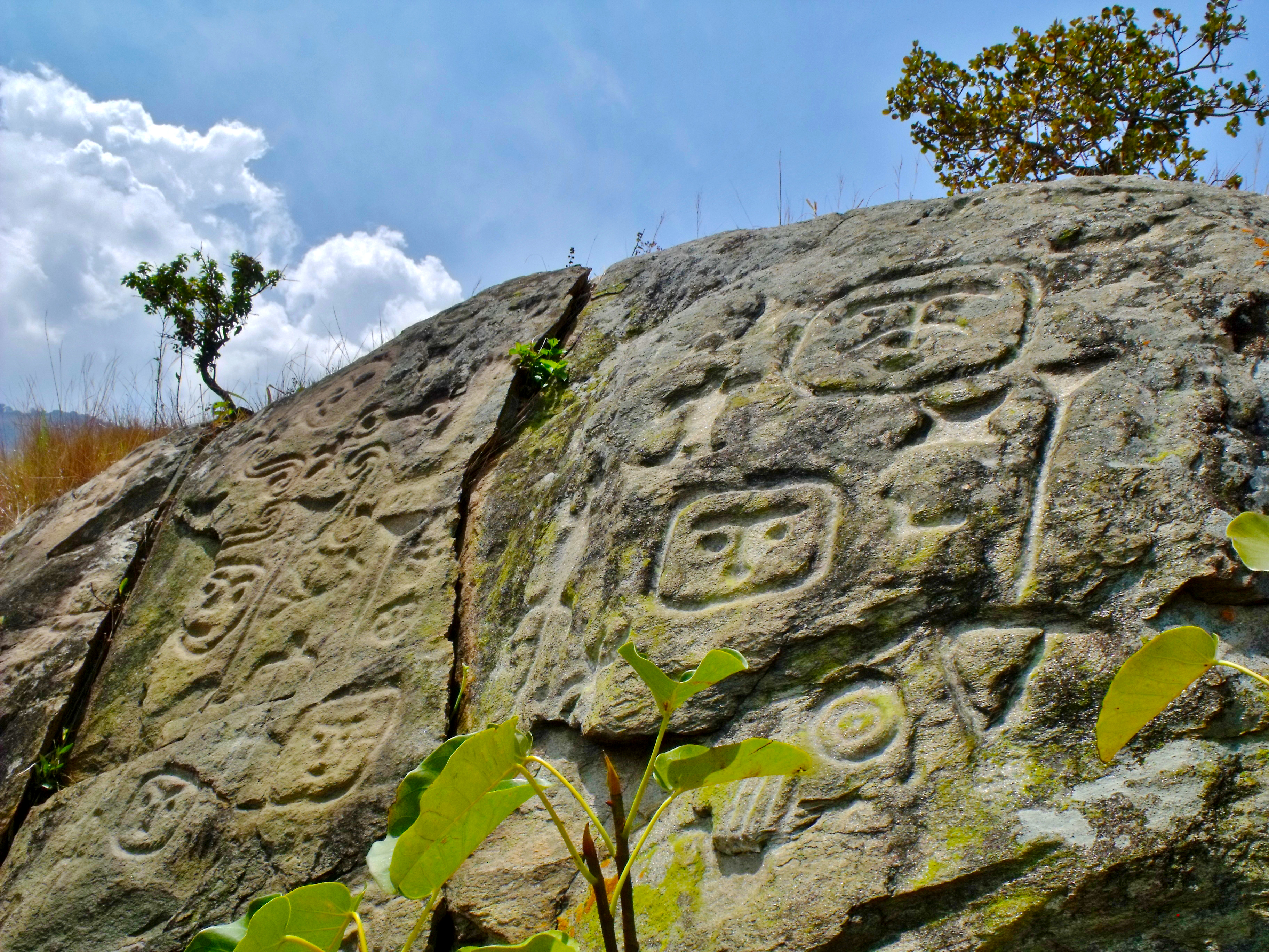 Estas montañas del municipio Guaraca en el estado Carabobo están repletas de piedras con petroglifos. Por todos lados hay increíble piedras talladas en la antigüedad por los indígenas. Un increíble obra para admirar. Foto en el camino indígena de la Sal entre Patanemo y Guacara. Parque Nacional San Esteban